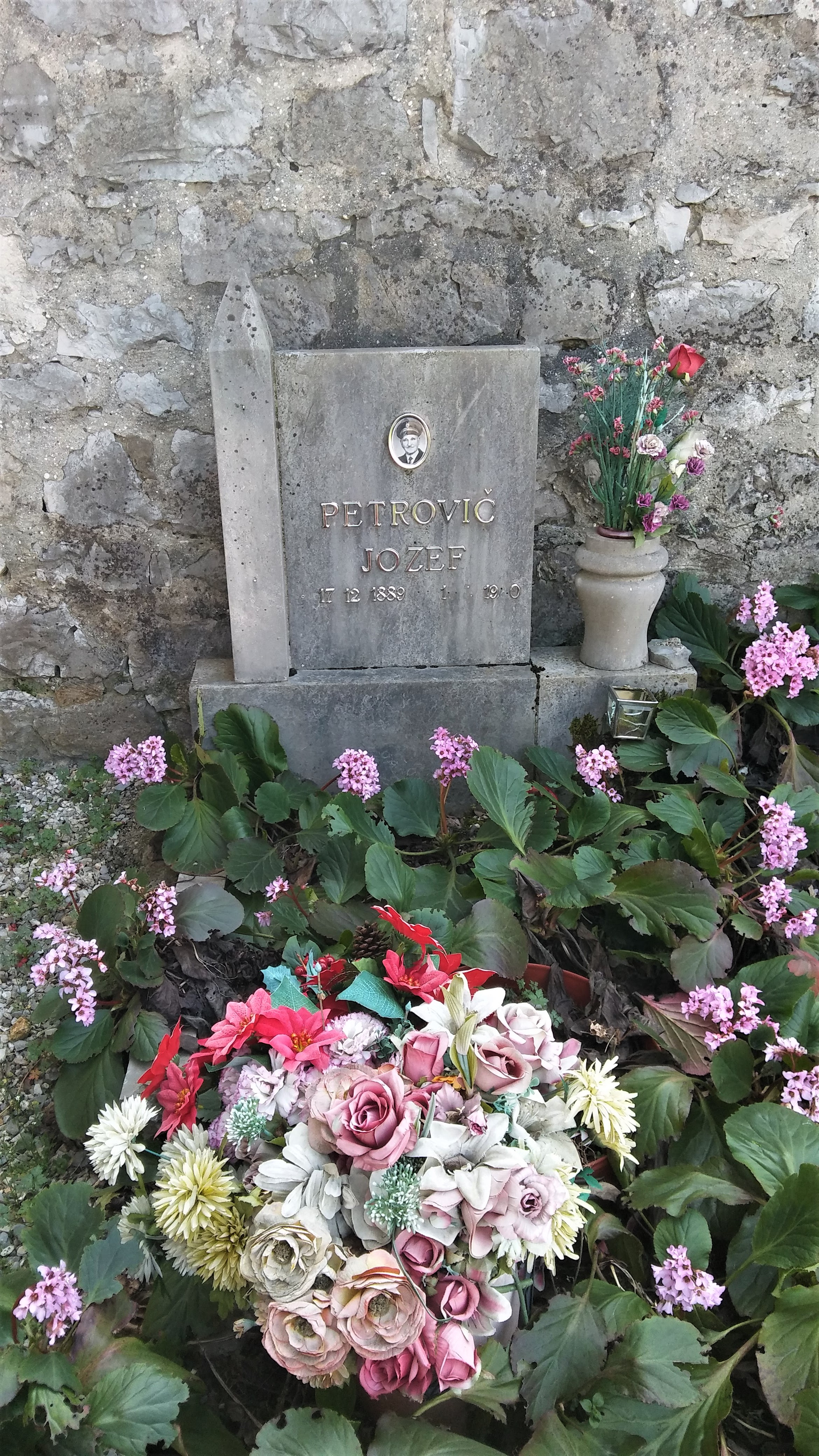 Fotografija groba glasbenika Jožefa Petroviča v Selah na Krasu